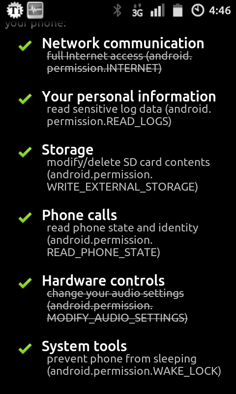 Монгол: application суулгах үед бид бүхний анзааралгүй Accert дардаг зүйл